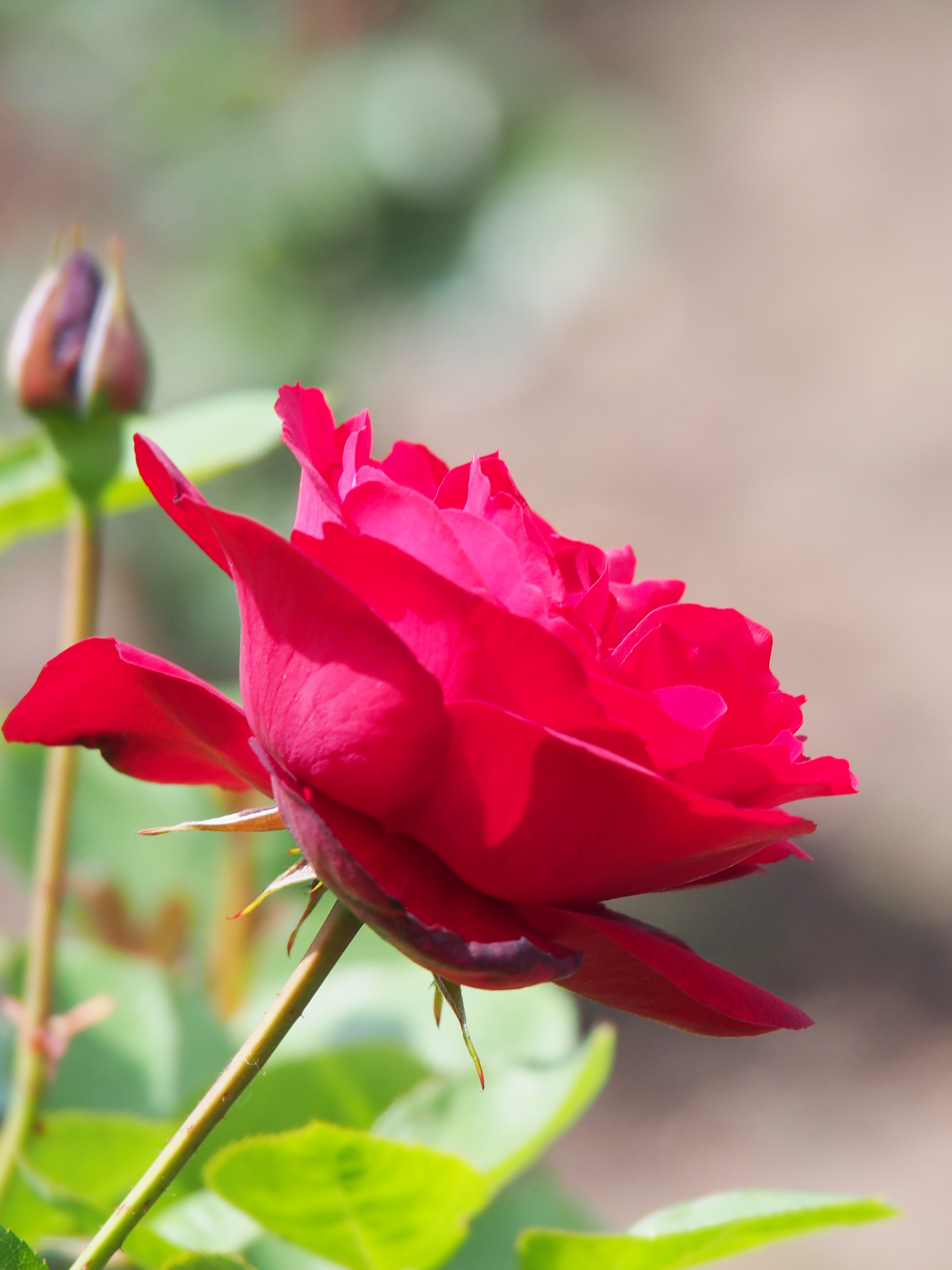 Rose, Lilli Marleen, バラ, リリー マルレーン, Floribunda rose フロリバンダ Germany ドイツ Kordes 1959